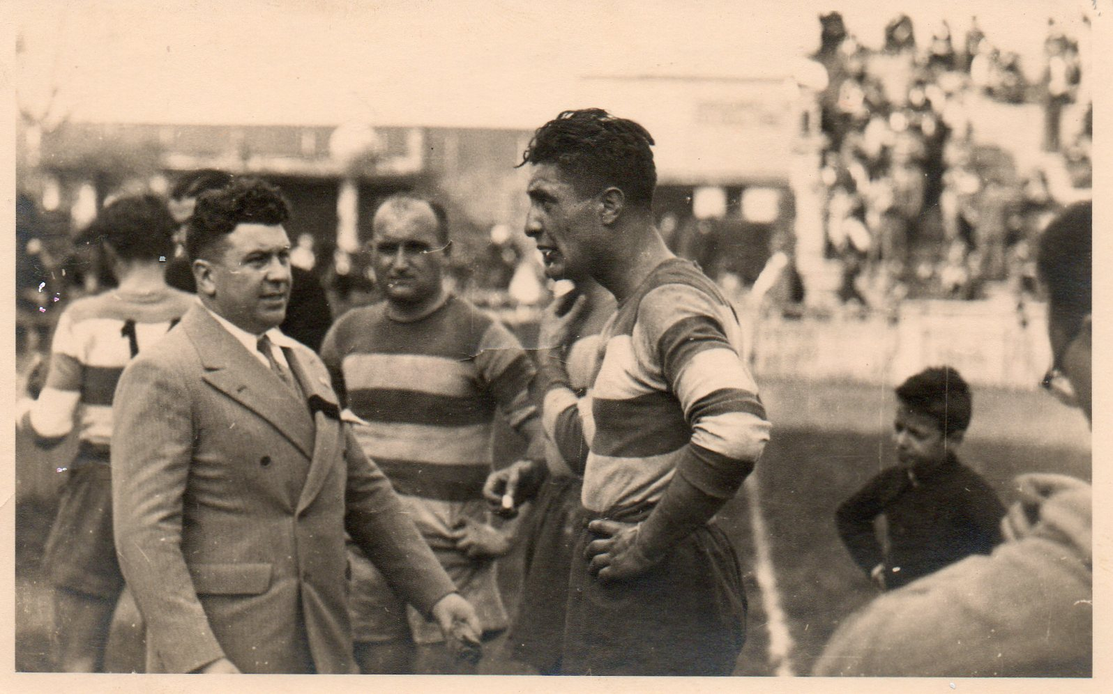 Michel Boucheron et le capitaine Vincenzo Bertolotto en pleine discussion.